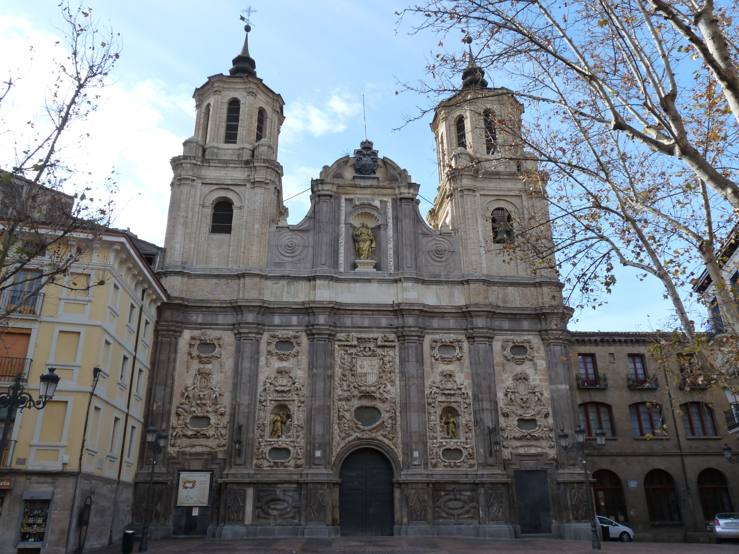 Zaragoza - Iglesia de Santa Isabel de Portugal de Zaragoza - Fachada